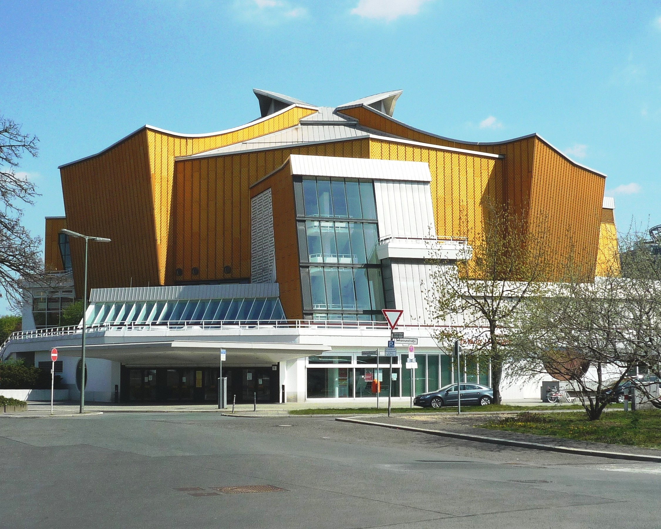 Kammermusiksaal der Philharmonie Berlin. Aussenansicht.